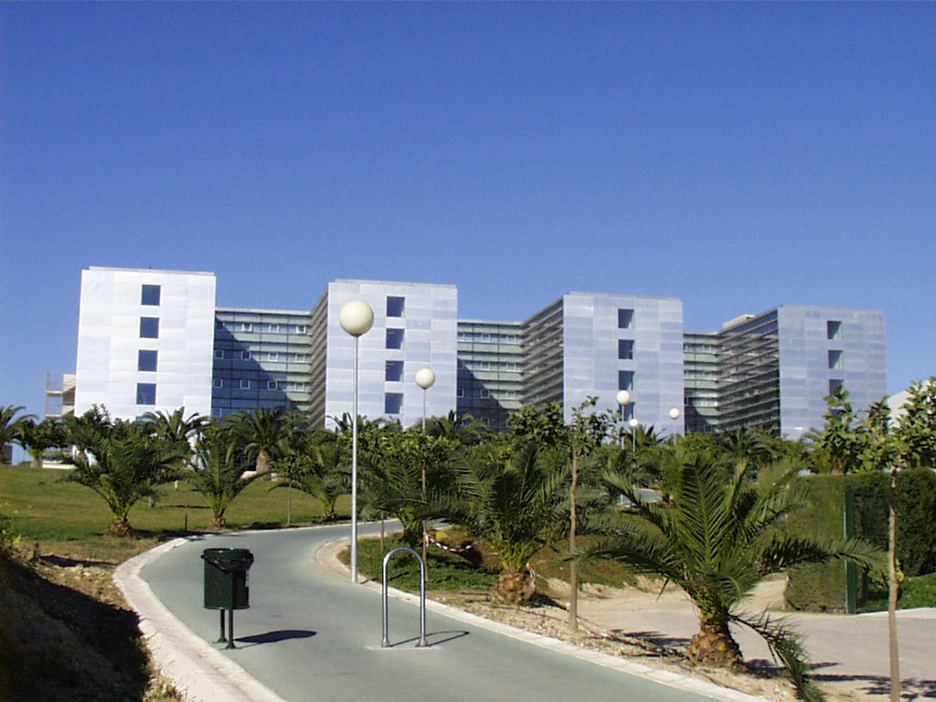 Vista frontal del edificio de la Facultad de Economía y Empresa de la Universidad de Murcia